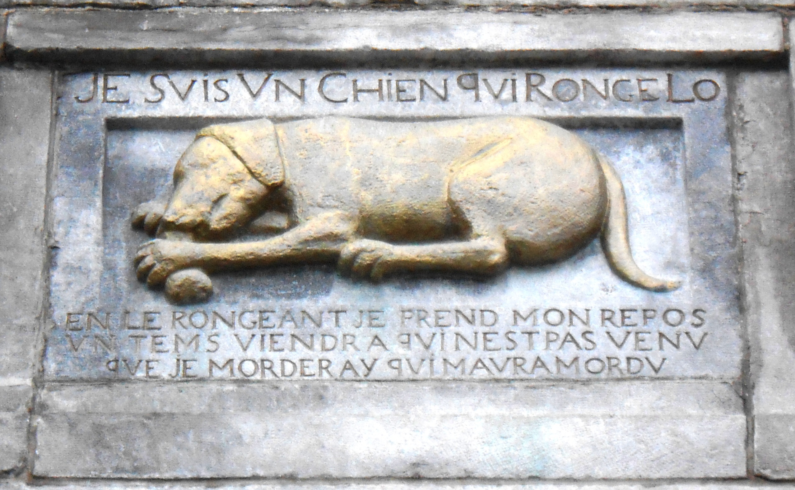 Chien d'or, détail architectural, Bureau de poste Haute-Ville, édifice Louis S. St-Laurent, Québec